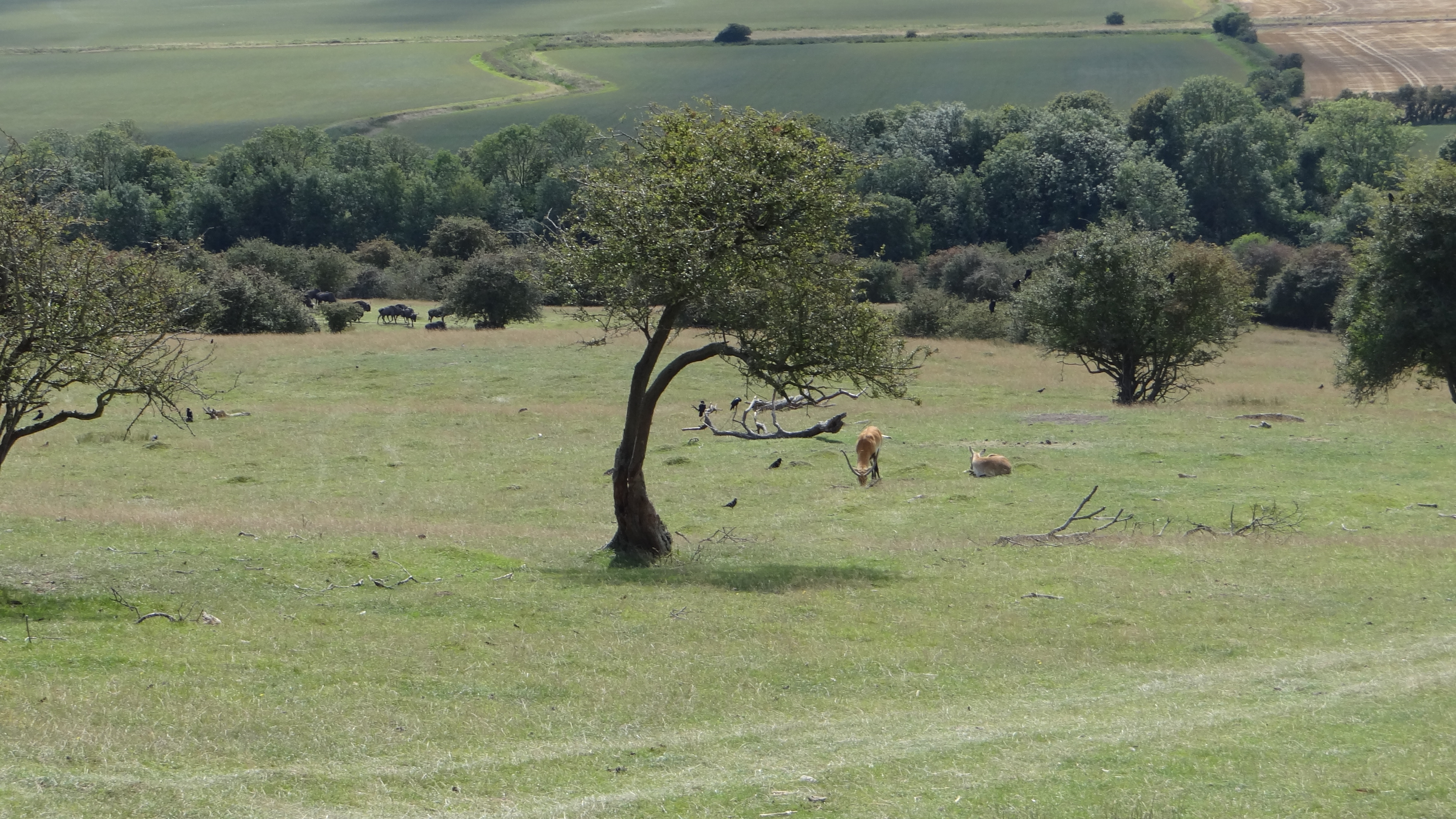 Zoo de Port Lympne